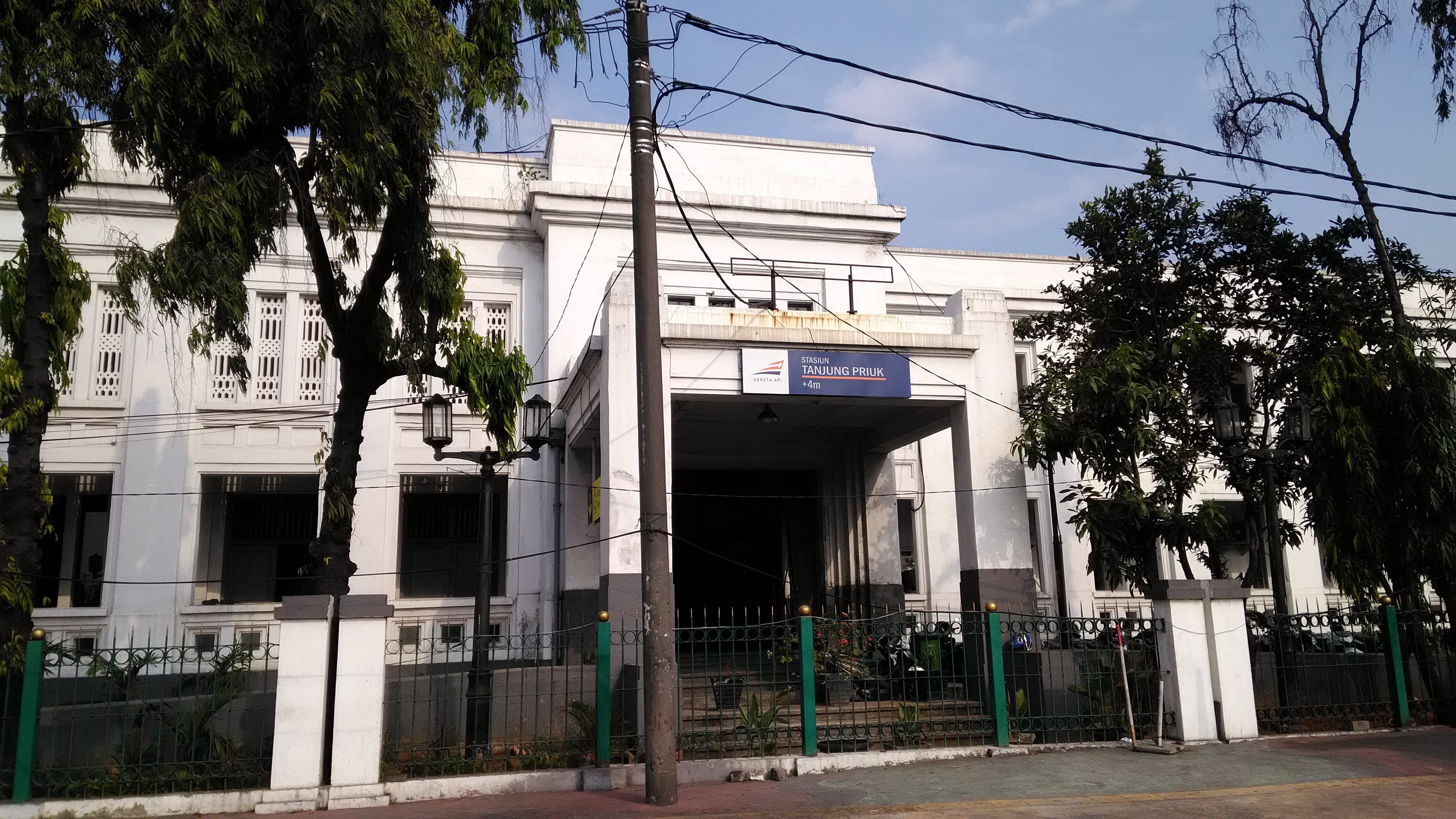 Stasiun Tanjung Priuk dengan Papan Nama Terbaru versi 2017